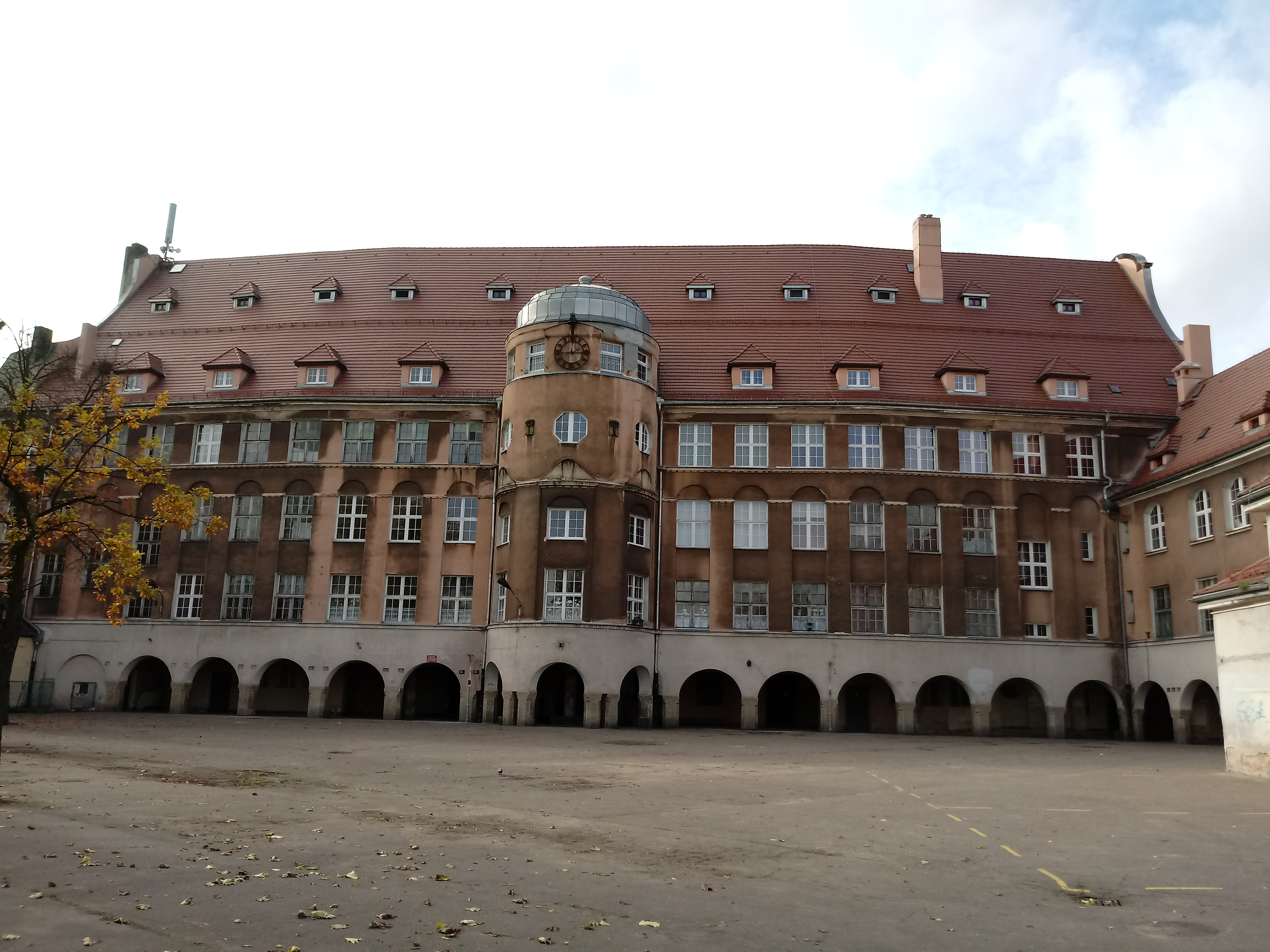 Szkoła przy ul. Różanej, widok od strony podwórza